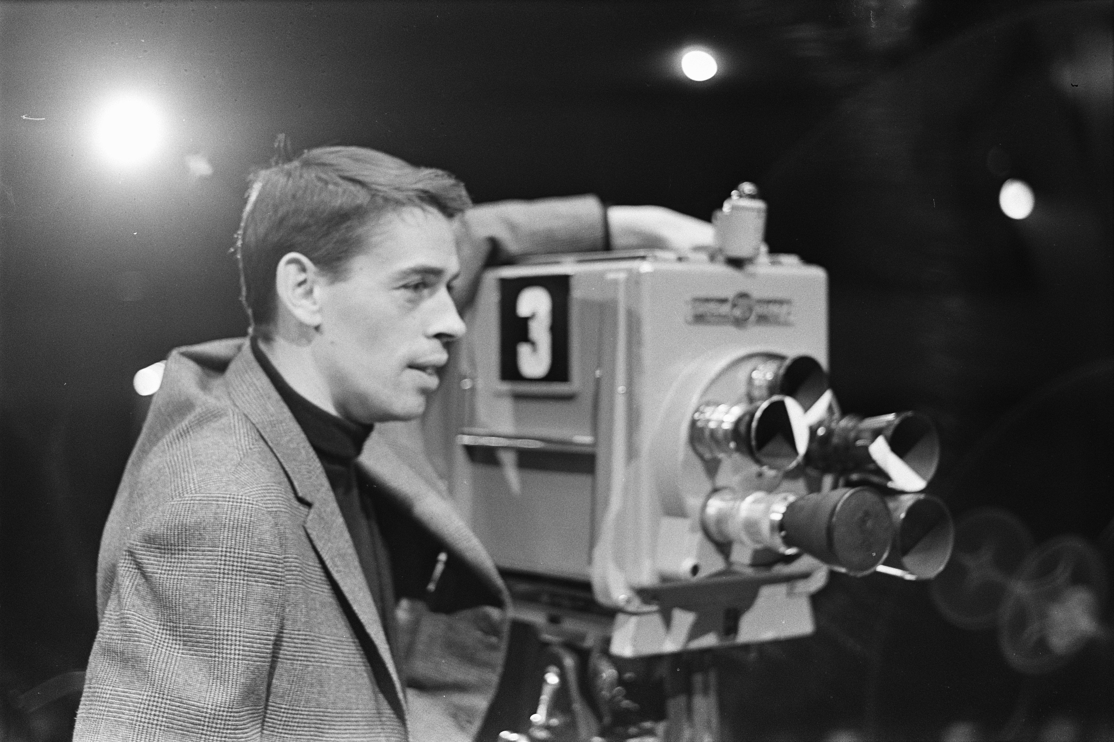 Collectie / Archief : Fotocollectie Anefo Reportage / Serie : [ onbekend ] Beschrijving : TV-uitzending "Domino" Jacques Brel tijdens de opname in Amsterdam, Marcanti Datum : 20 februari 1963 Locatie : Amsterdam, Noord-Holland Trefwoorden : TV-programma's, camera's, zangers Persoonsnaam : Brel, Jacques Fotograaf : Bilsen, Joop van / Anefo Auteursrechthebbende : Nationaal Archief Materiaalsoort : Negatief (zwart/wit) Nummer archiefinventaris : bekijk toegang 2.24.01.05 Bestanddeelnummer : 914-8400